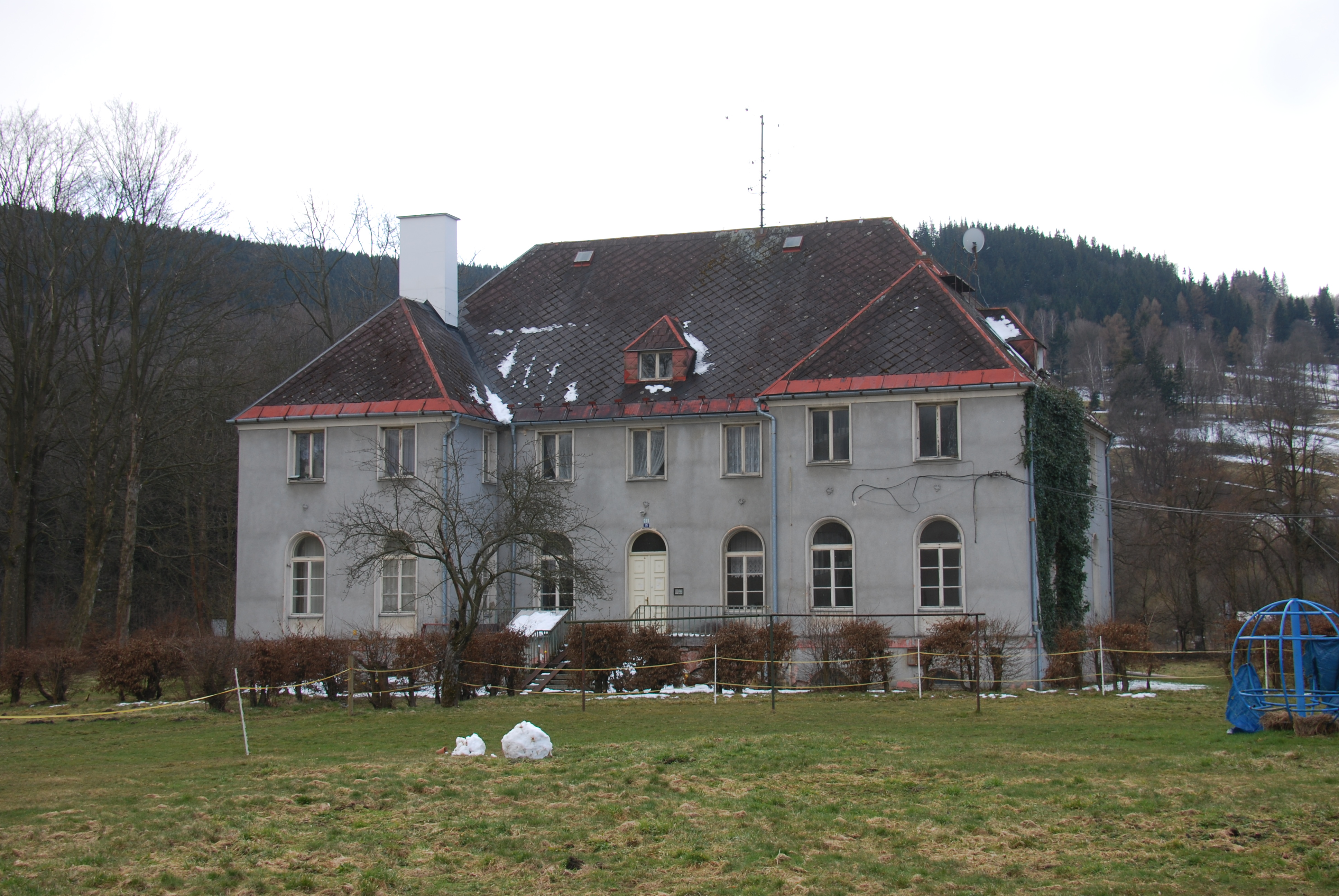 Vila čp. 298, Vrbno pod Pradědem.